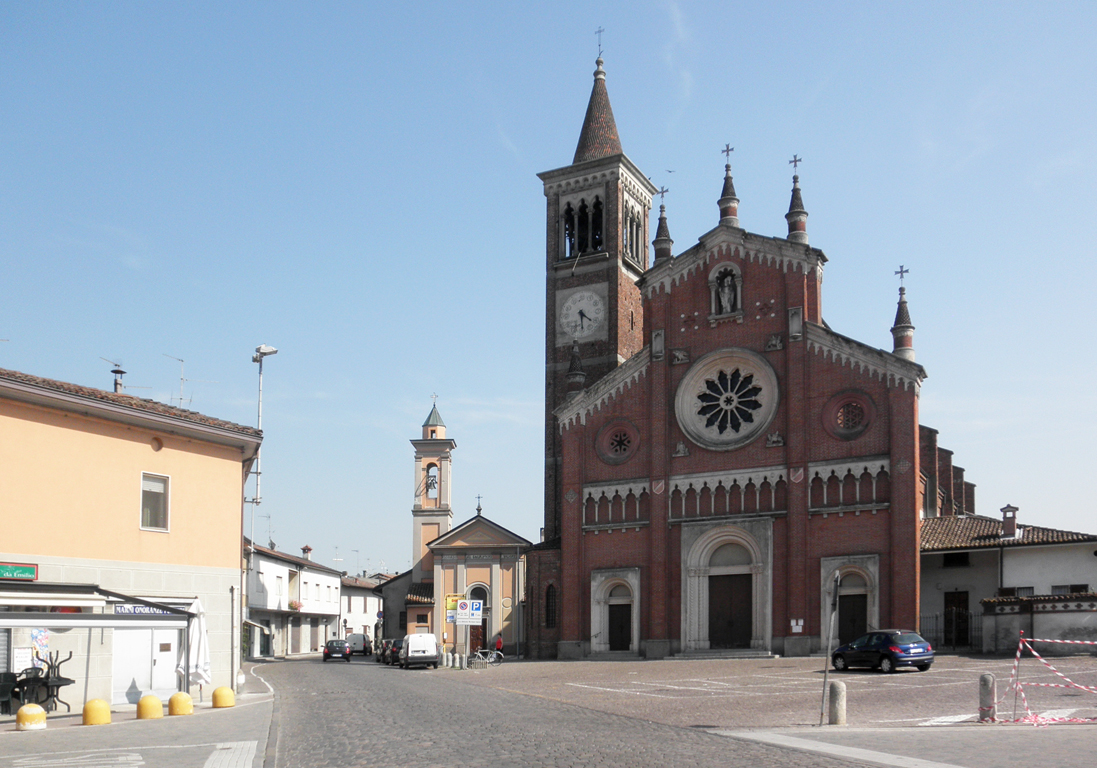 Secugnago, piazza Matteotti e la chiesa parrocchiale di San Gaudenzio Vescovo.